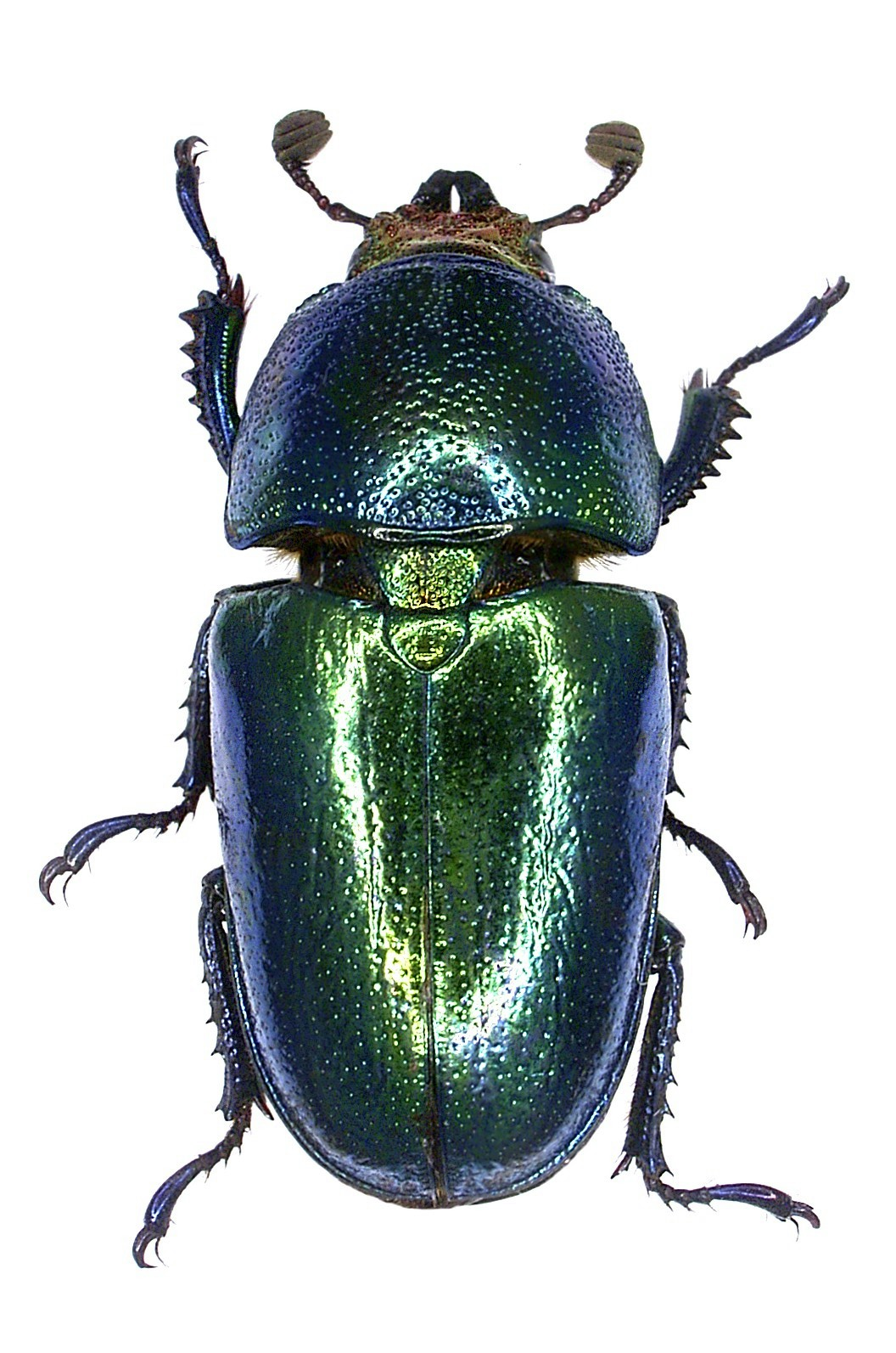 Familie: Lucanidae Größe: 24 mm Fundort: Indonesien, Irian Jaya, Manokwari-Prov., Ransiki leg.det. A.Skale, 2007 Foto: U.Schmidt, 2007